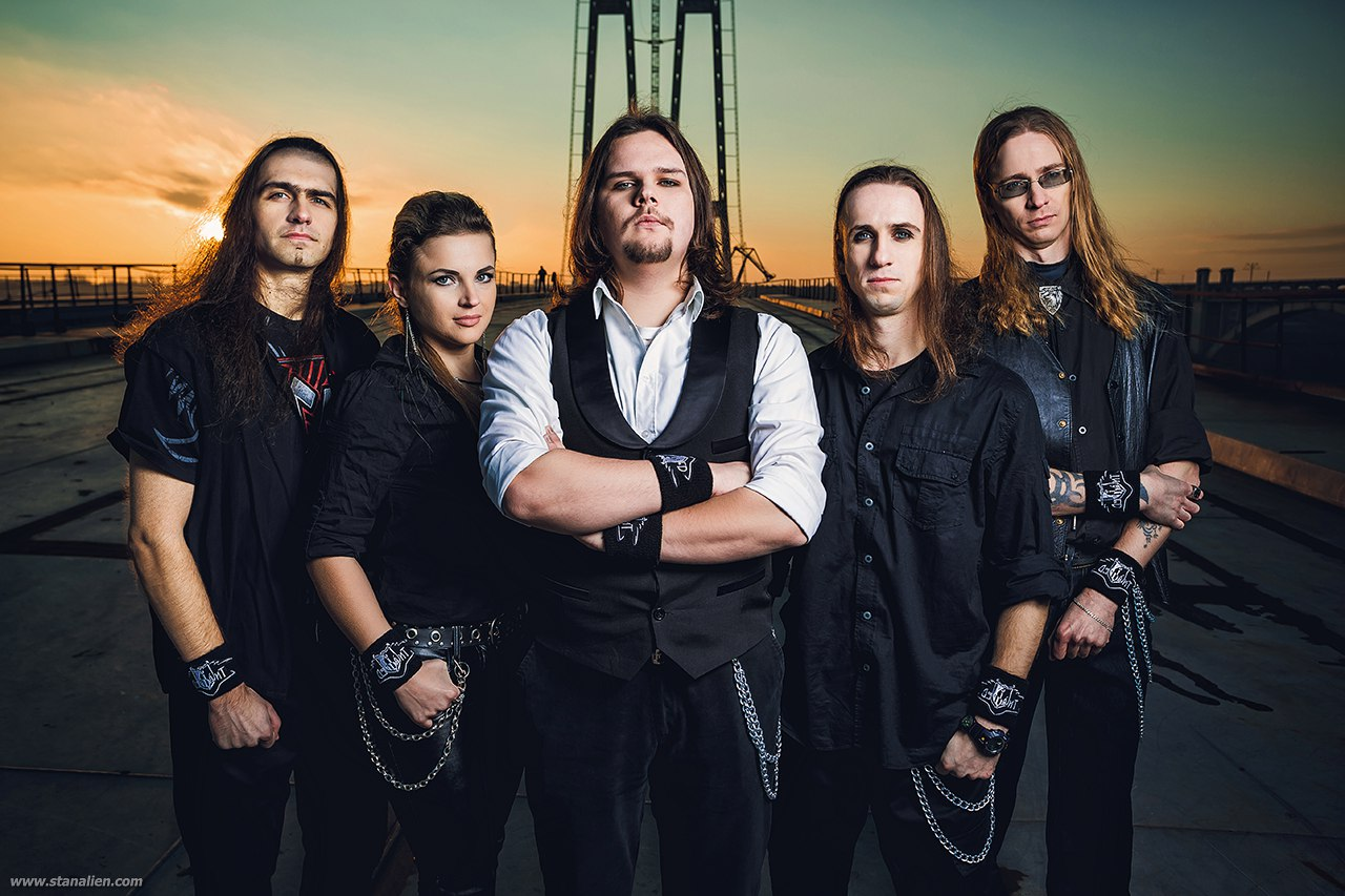 Склад гурту Defiant на початок 2016 року. Фотосесiя в оновленому складi. Фотограф - Станiслав Полiщук